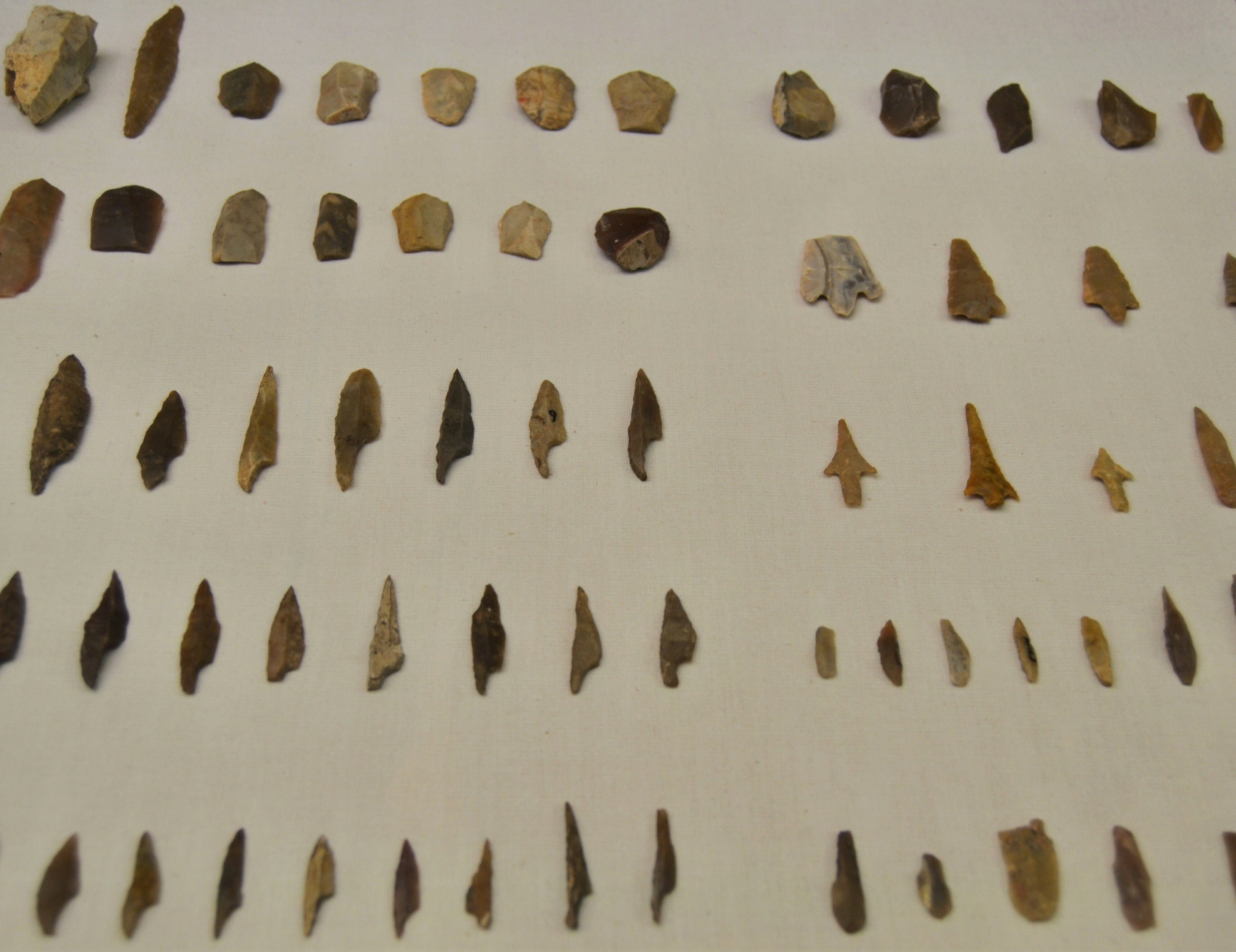 Útils de talla, cova del Parpalló (Gandia) i de les Malladetes (Barx), Paleolític Superior Final (18.000 - 14.000 aC). Museu de Prehistòria de València.